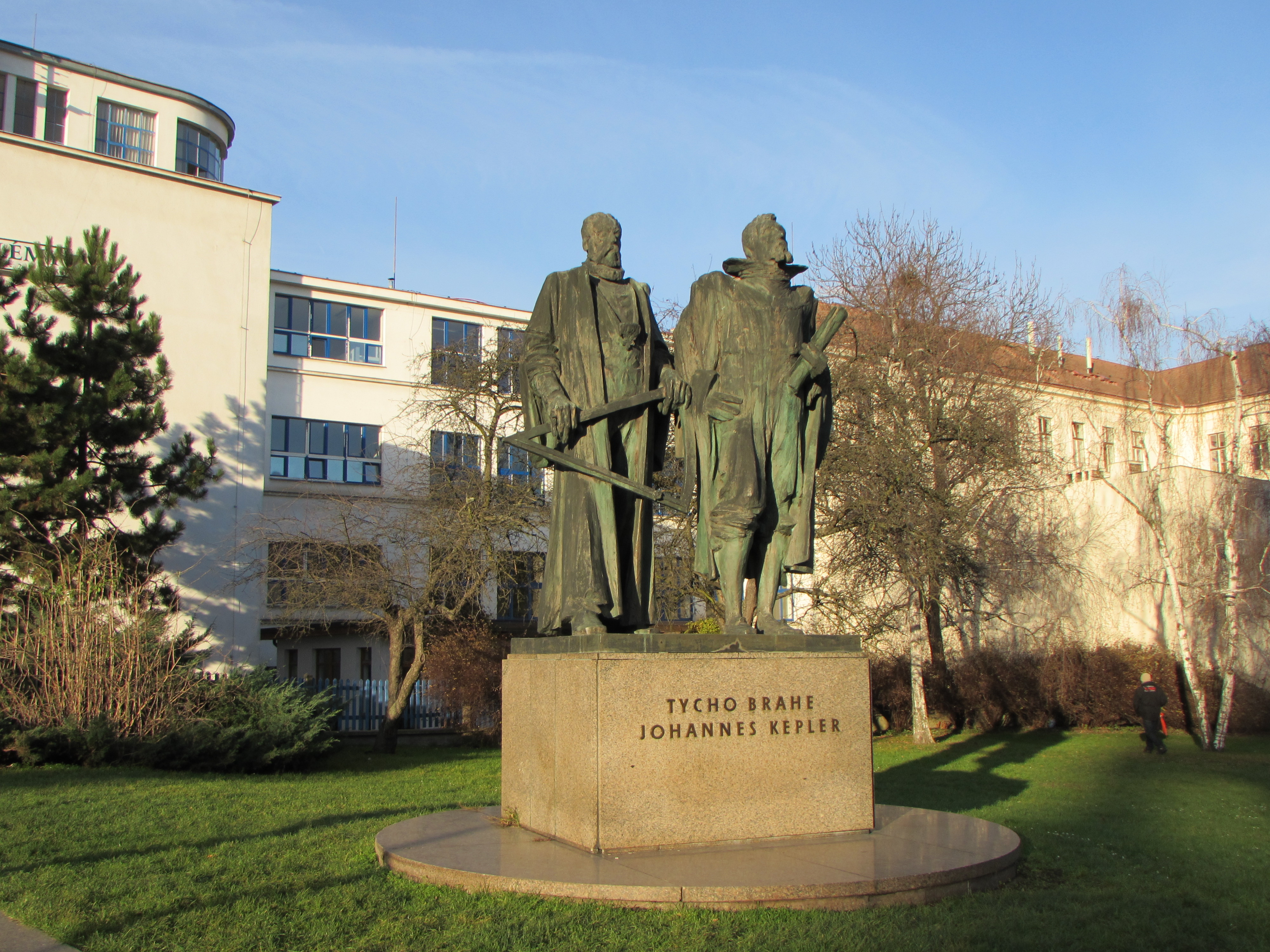 Monumento a Brahe e Keplero, sulla collina di Praga